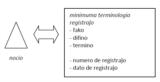 Dudirekta unika rilato inter nocio kaj minimuma terminografia registraĵo.